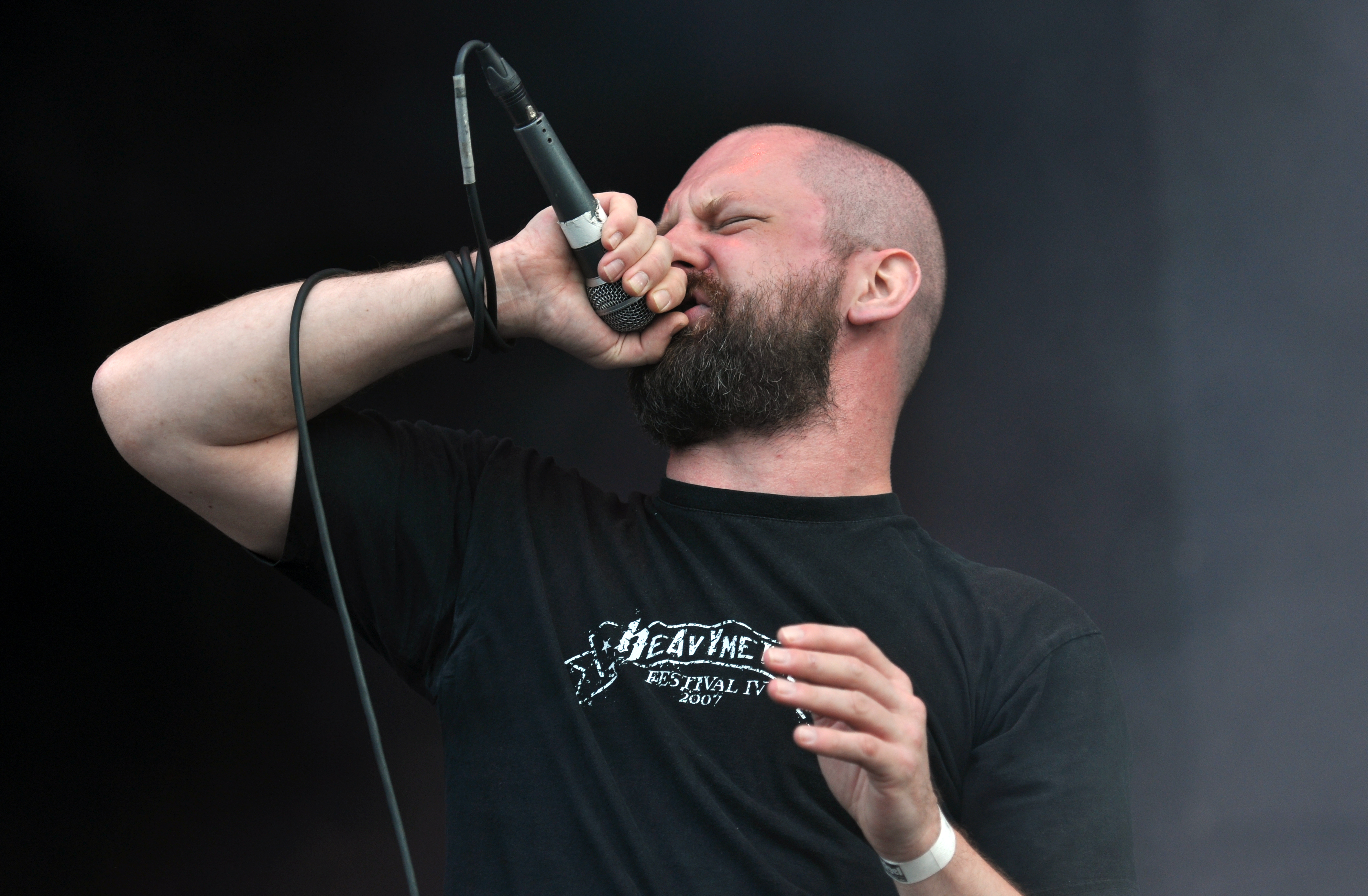 Anaal Nathrakh at Party.San Metal Open Air 2013